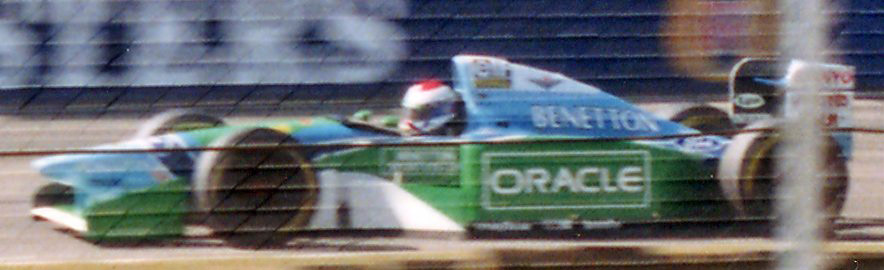 Jos Verstappen on Benetton Formula 194